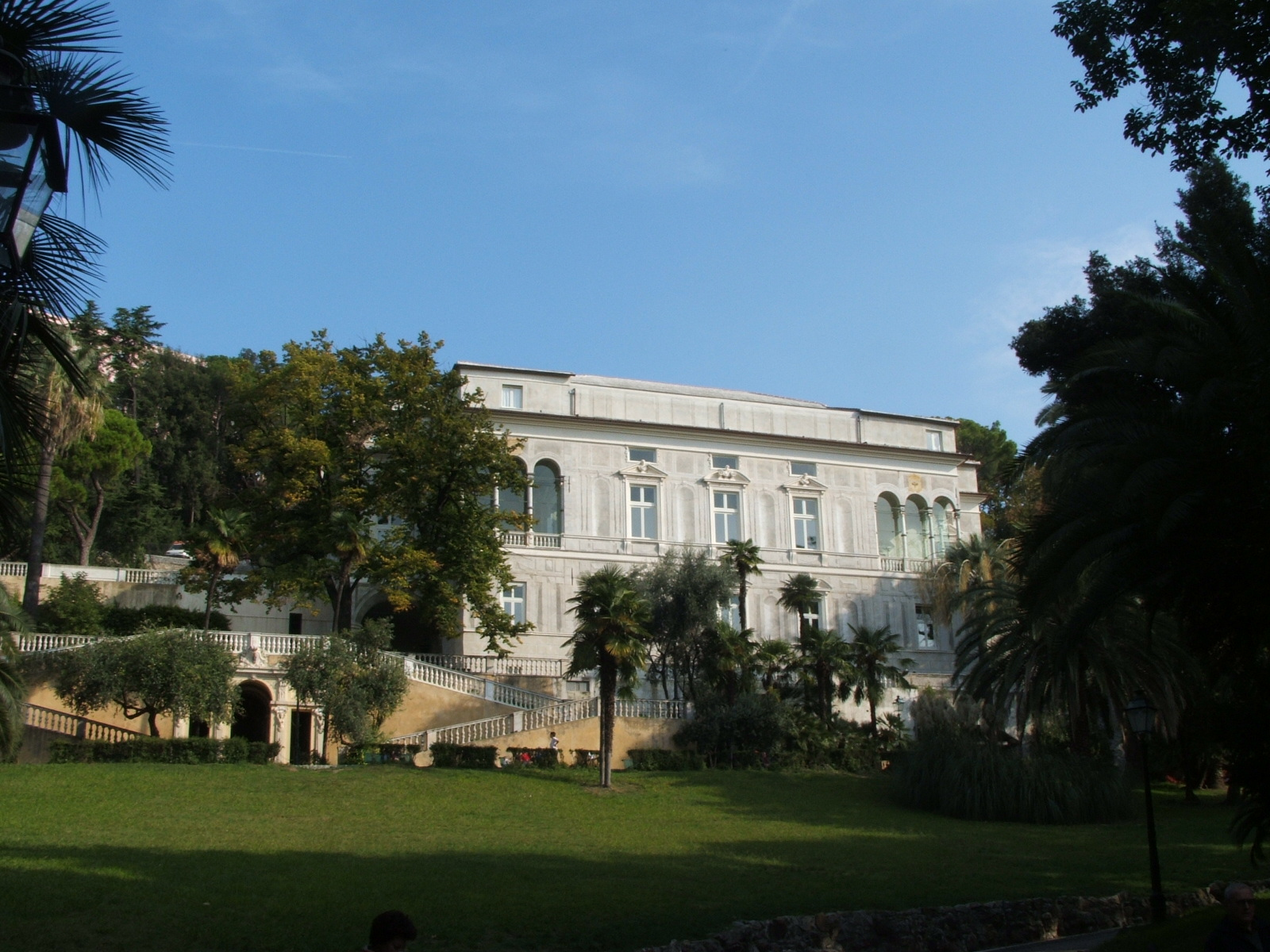 Immagine dalla città di Genova. Parco di Villa Imperiale.